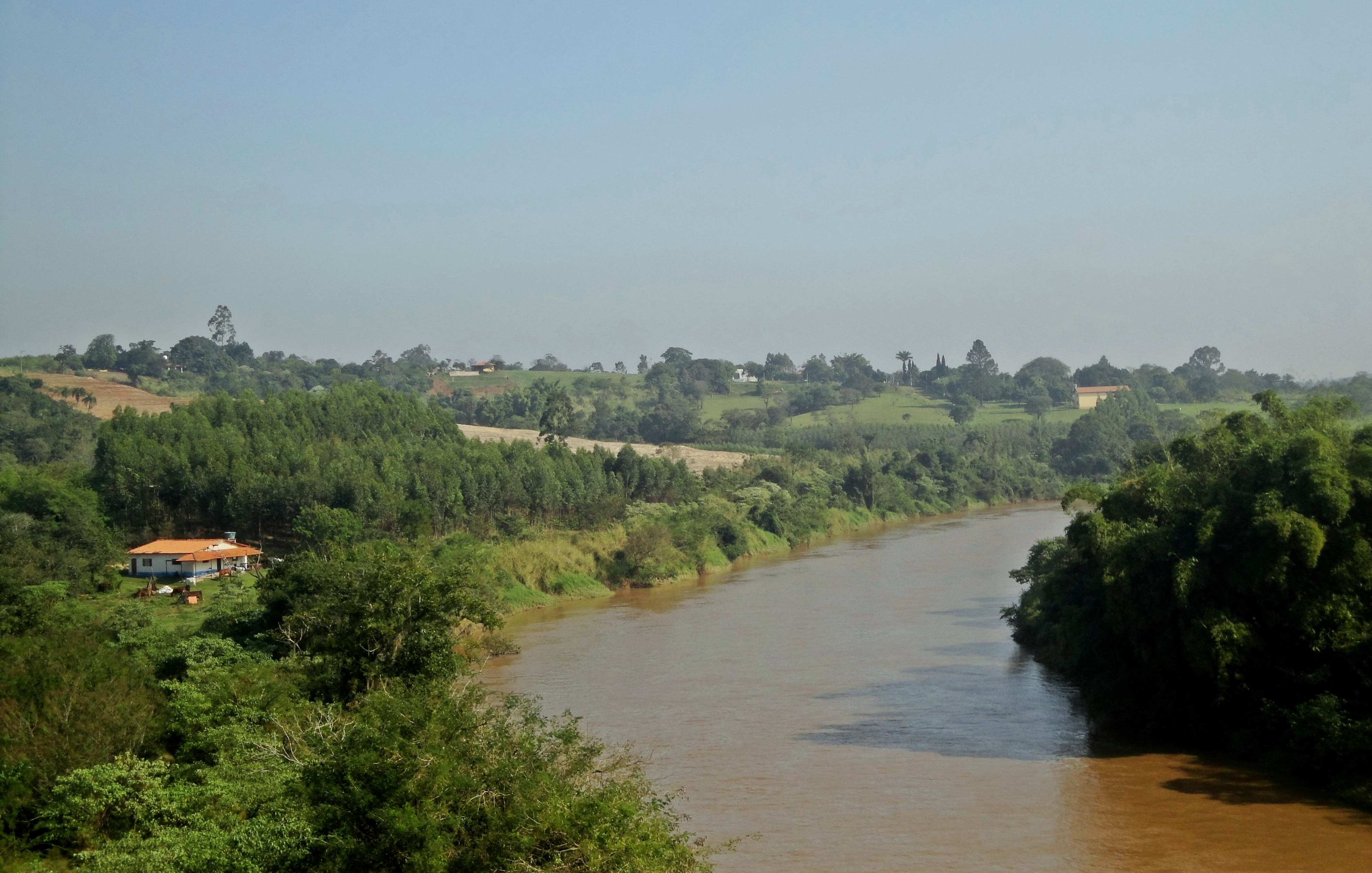 Rio Piracicaba visto da Rodovia dos Bandeirantes - SP-348 Km-138